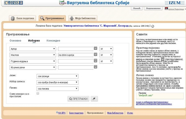 Српски (ћирилица): Електронски каталог